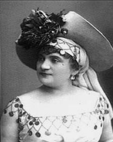 Zulma Bouffar (cliché Nadar)